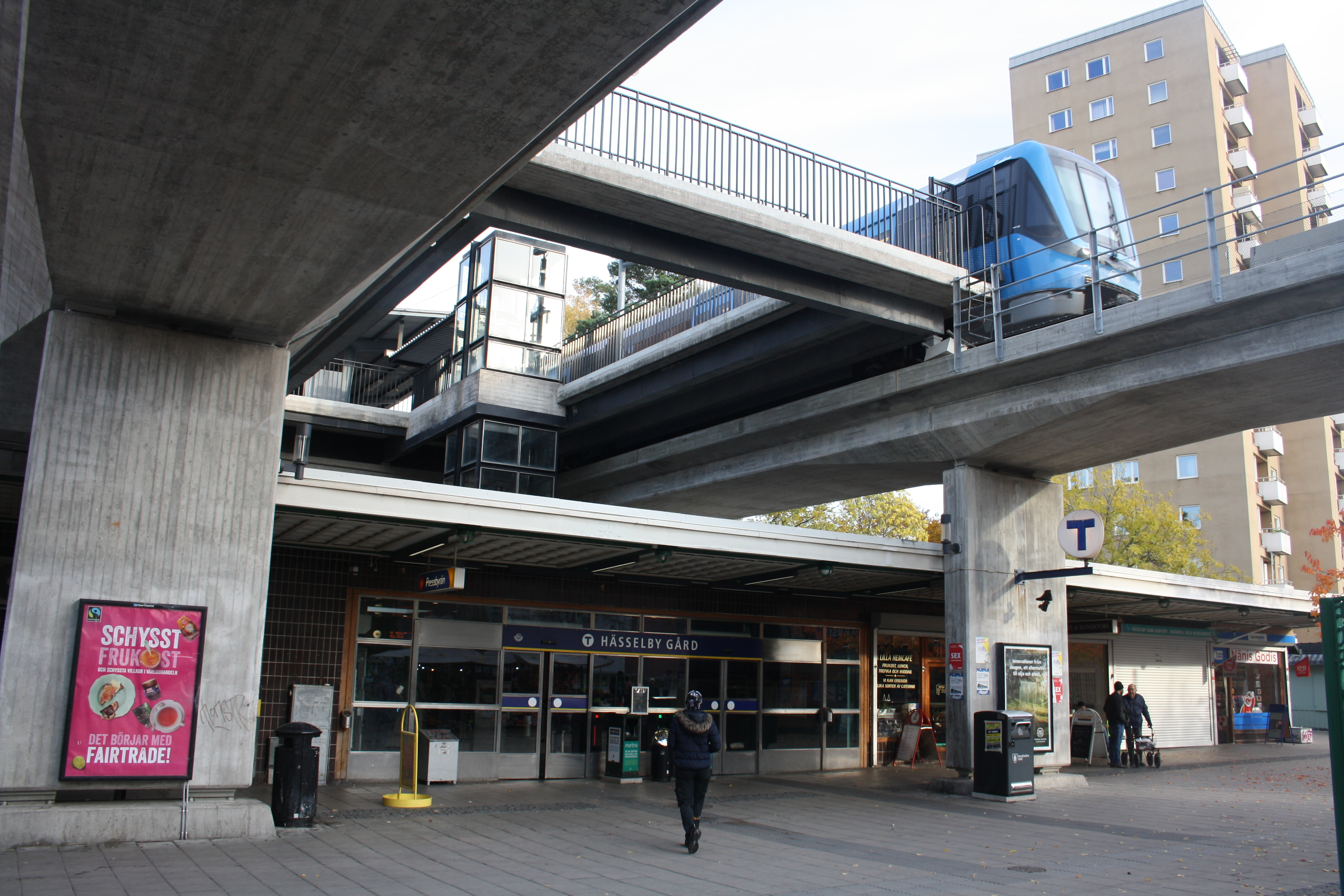 Hässelby Gård tunnelbana